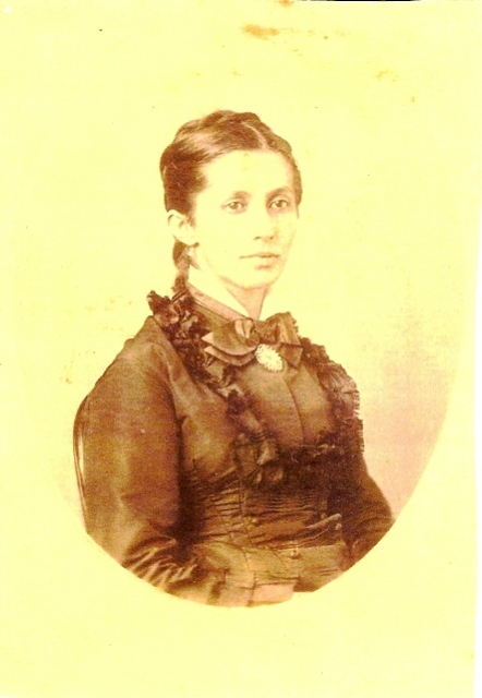 Viscondessa trajando roupa em seda